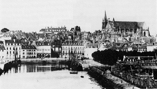 Cliché de Vannes antérieur à 1860 - Prise du port, vue sur les remparts